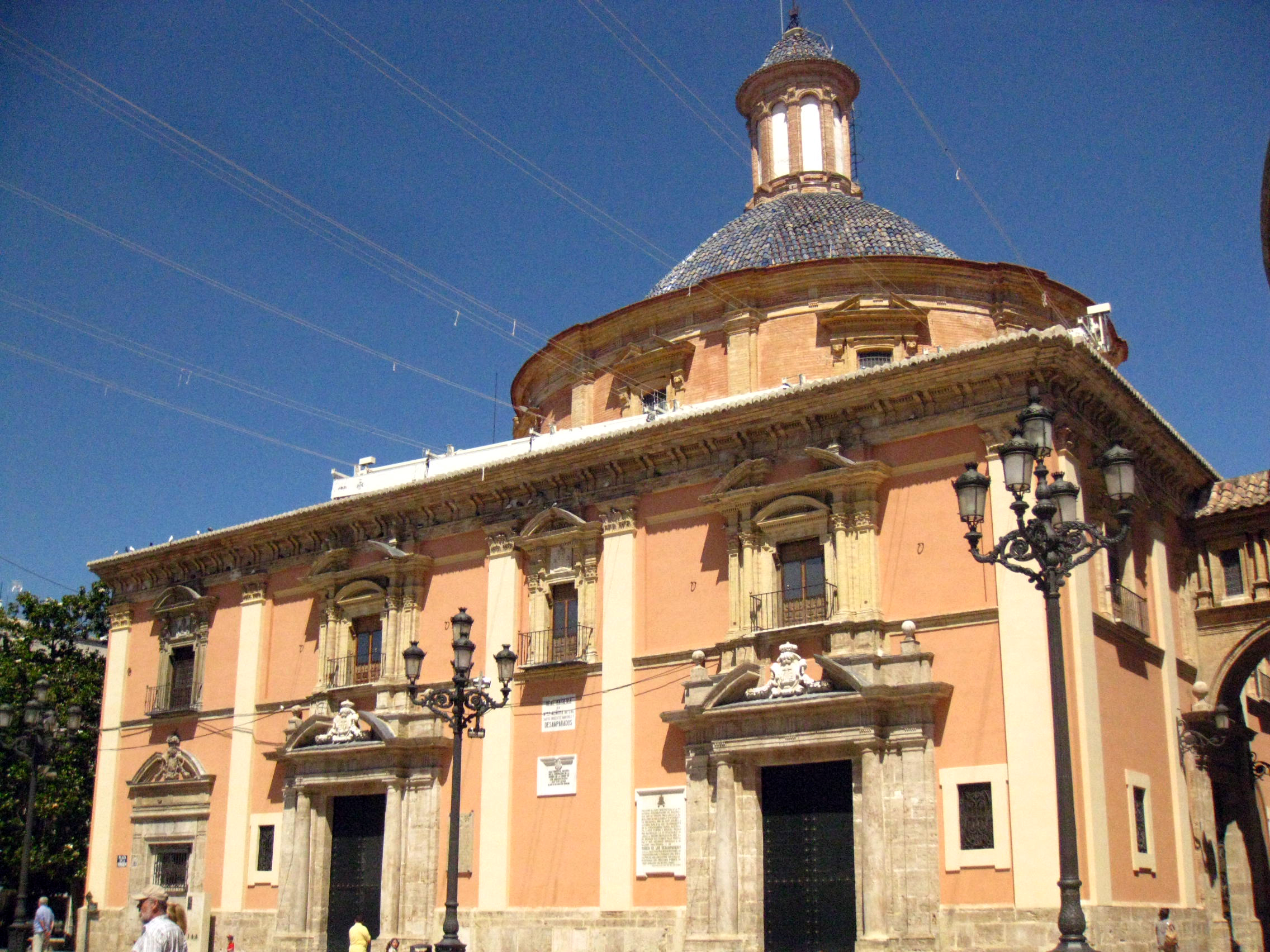 Reial Basílica de la Mare de Déu dels Desemparats (València)